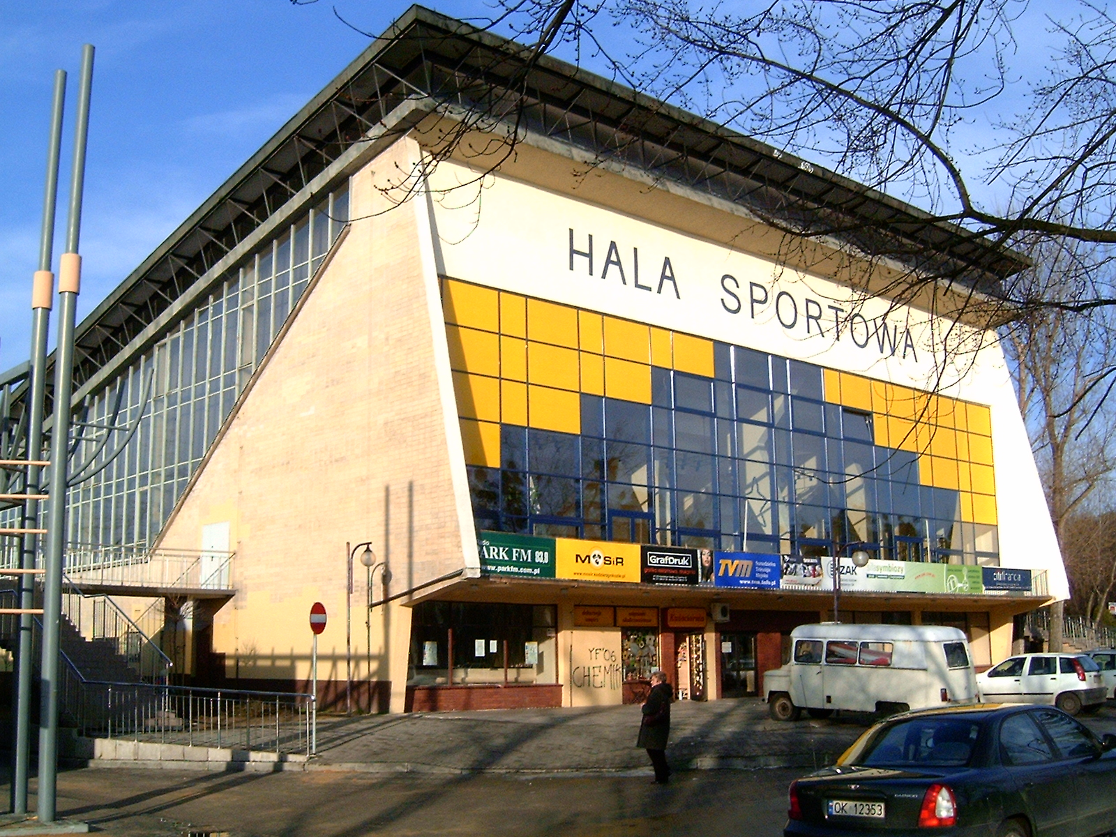 Hala sportowa przy Al.Jana Pawła II - Kędzierzyn-Koźle, woj. opolskie, Polska.